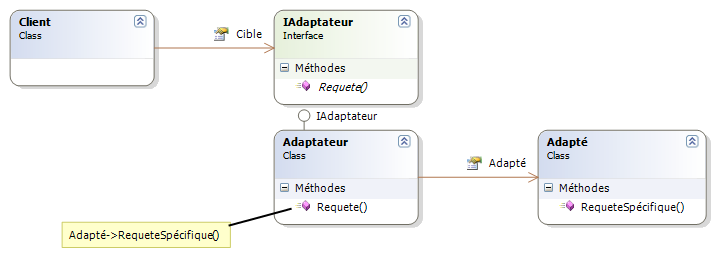 Schéma UML du Design Pattern Adapter